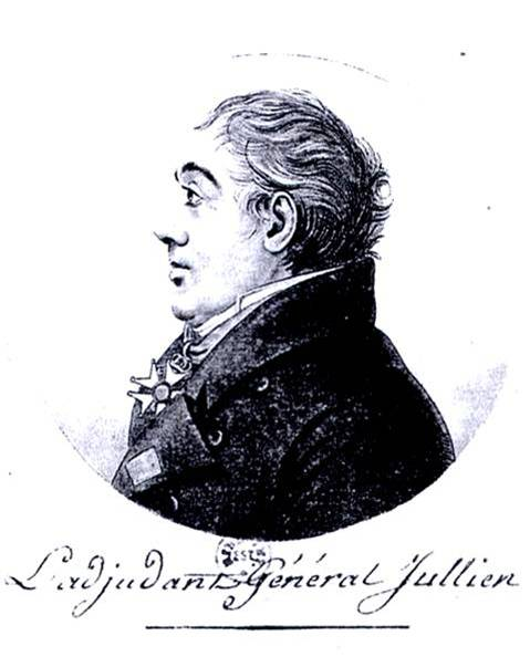 Lithographie de l'adjudant-général Jullien, vers 1800. Œuvre détenue à la bibliothèque de France.